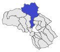 Mapa del terme comunal d'Angostrina i Vilanova de les Escaldes fet a partir d'un mapa de lliure disposició.